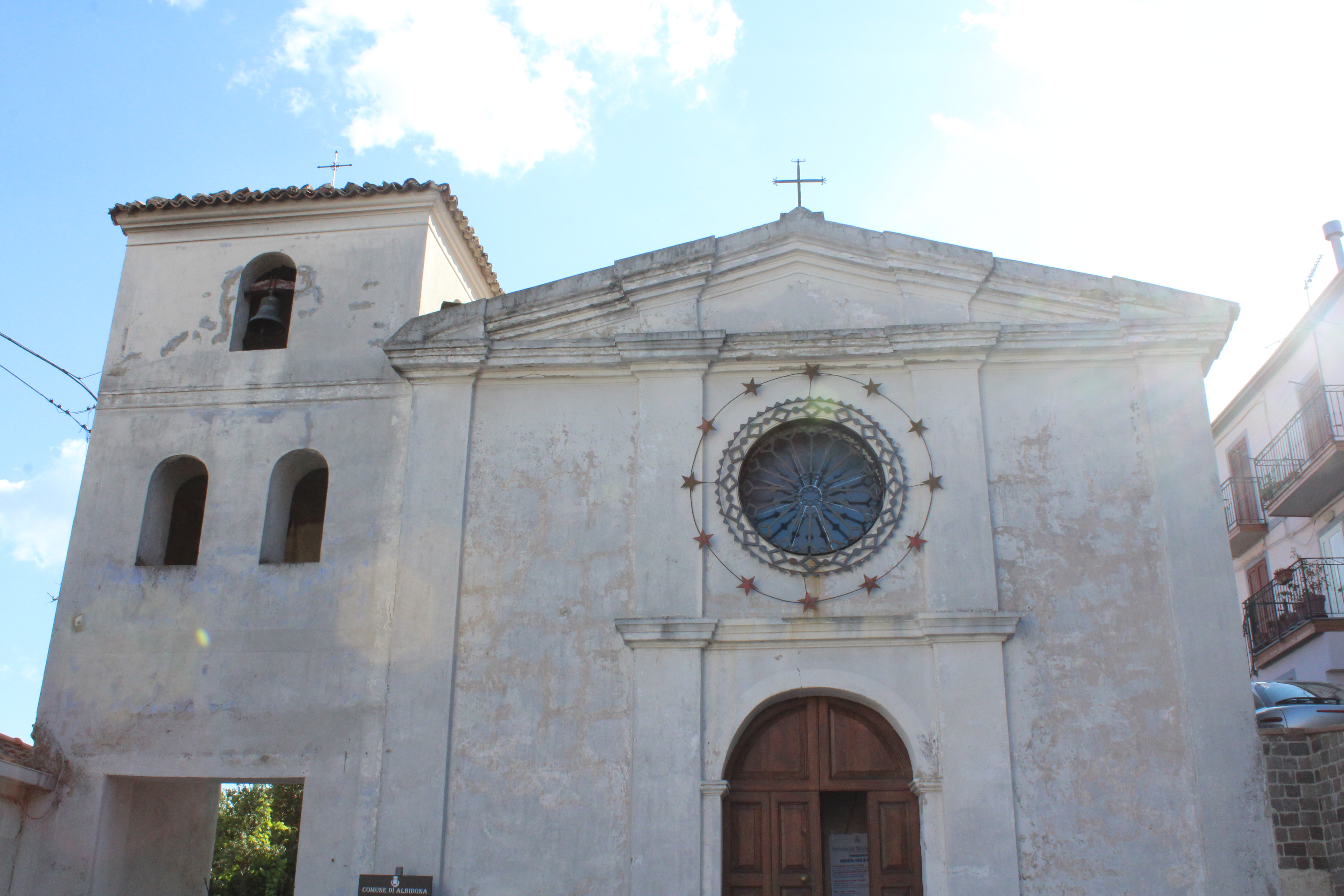 Chiesa di Sant'Antonio (Albidona).